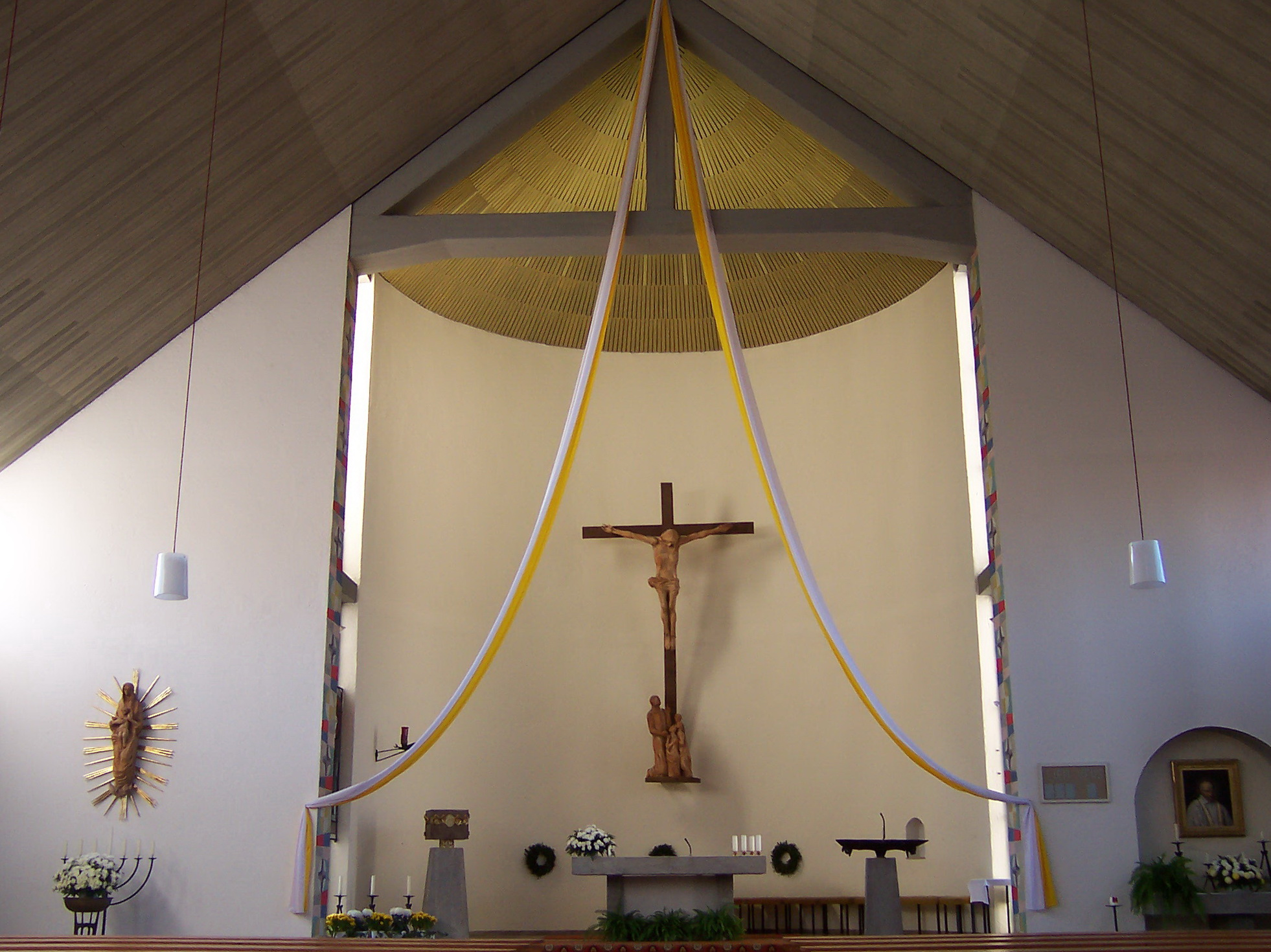 Pfarrkirche St. Vinzenz von Paul in Auloh, einem Stadtteil im Osten der niederbayerischen Bezirkshauptstadt Landshut. Moderner Kirchenbau, der in den Jahren 1961/62. Innenraum.